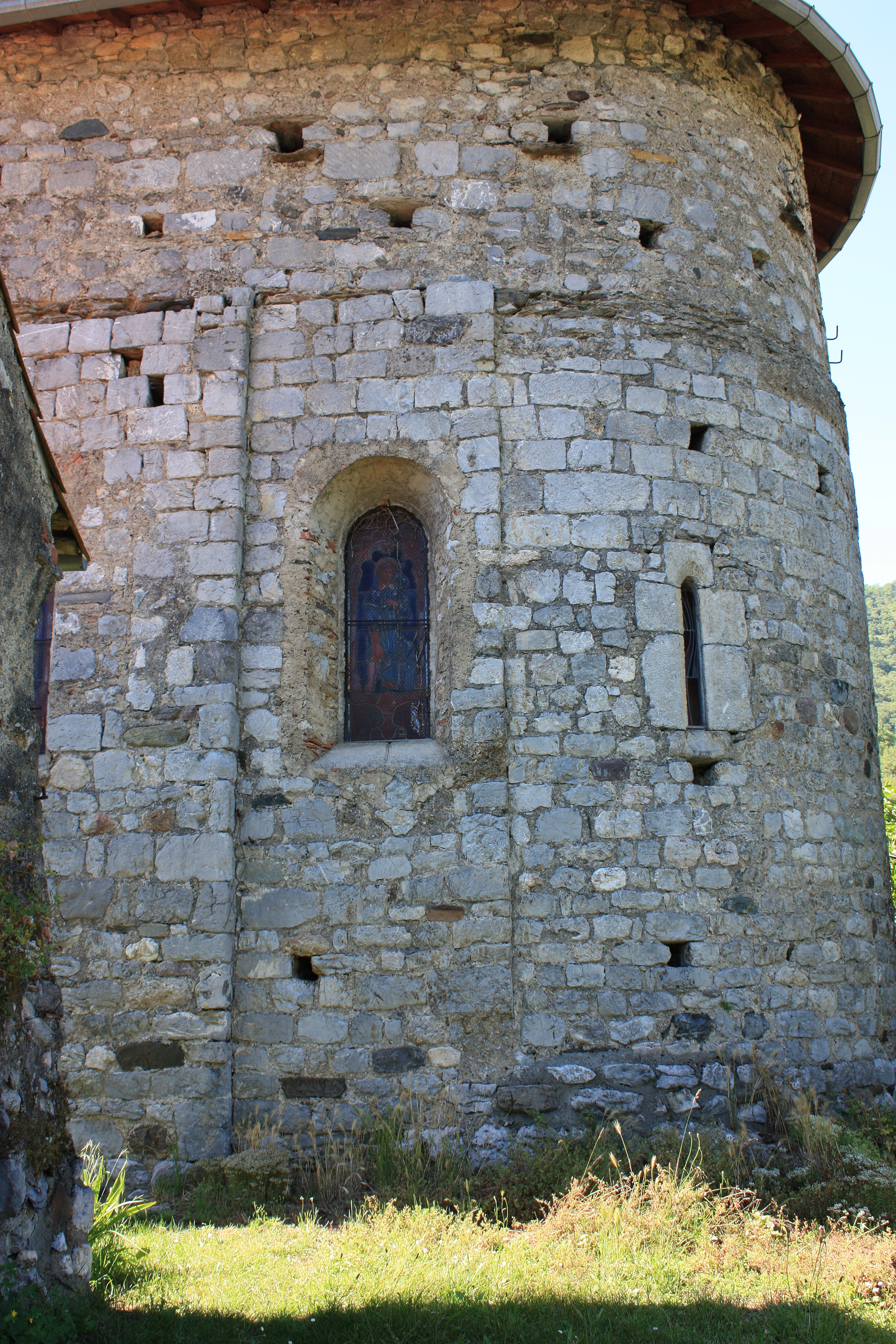 Génos - Eglise Saint-Roch